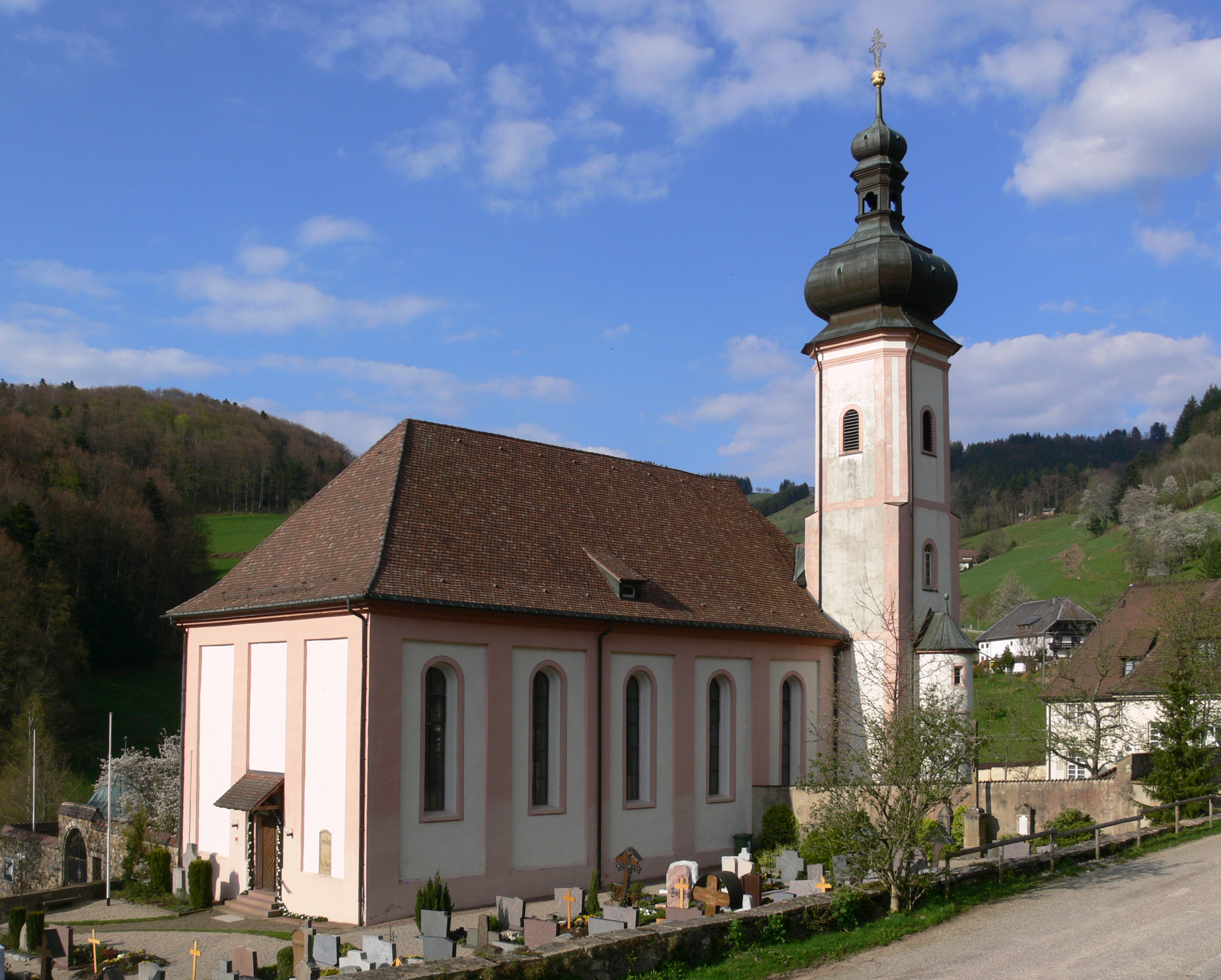 Pfarrkirche (ehem. Benediktinerprioratskirche) St. Ulrich im Schwarzwald, Gemeinde Bollschweil